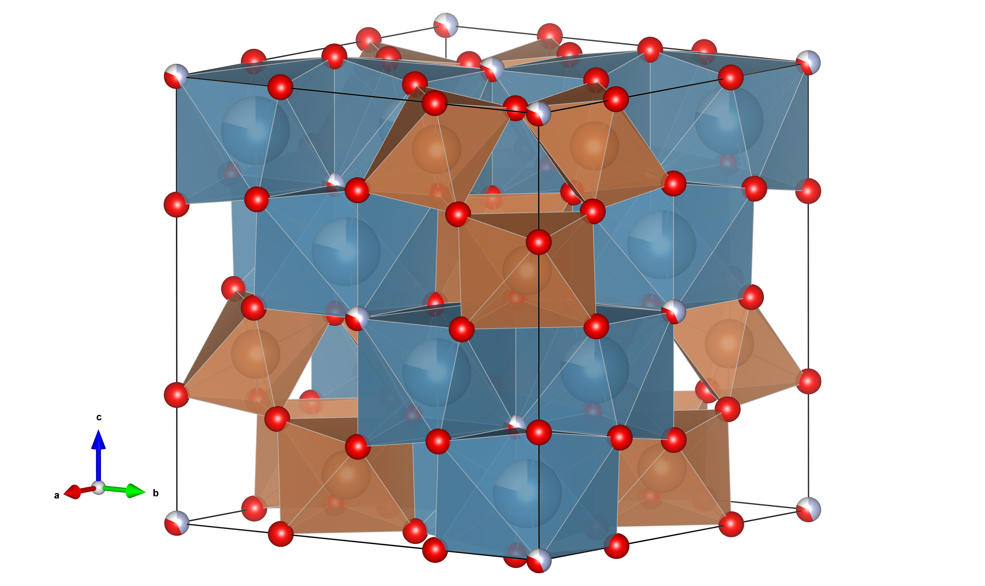 Kristallstuktur von Fluorcalcioroméit als „Polyeder-Modell“. Erstellt mithilfe des freien Strukturprogramms VESTA und den CIF-Daten von M. A. Aia, R. W. Mooney, C. W. W. Hoffman Farblegende: BO6-Oktaeder: braun; AO8-Polyeder: graublau; Sauerstoff: rot.